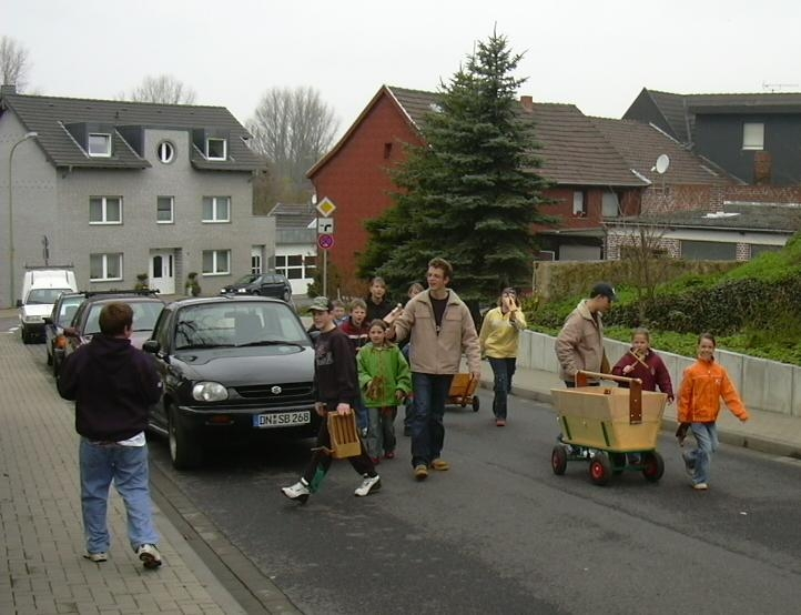 Klappern am 15.4.06 in Hochkirchen.